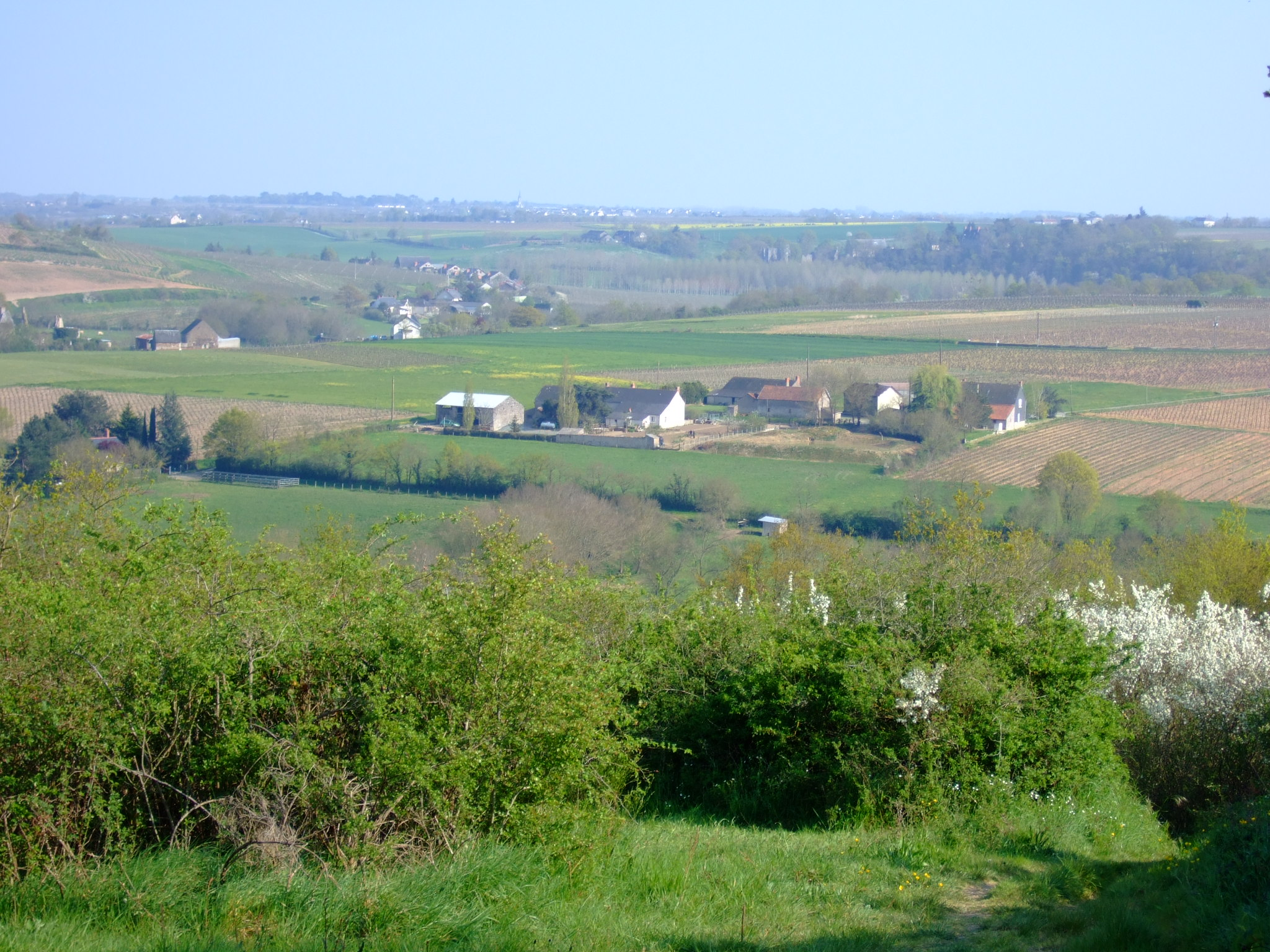 La vallée du Layon depuis le sentier de randonnée entre Ardenay et La Haie Longue